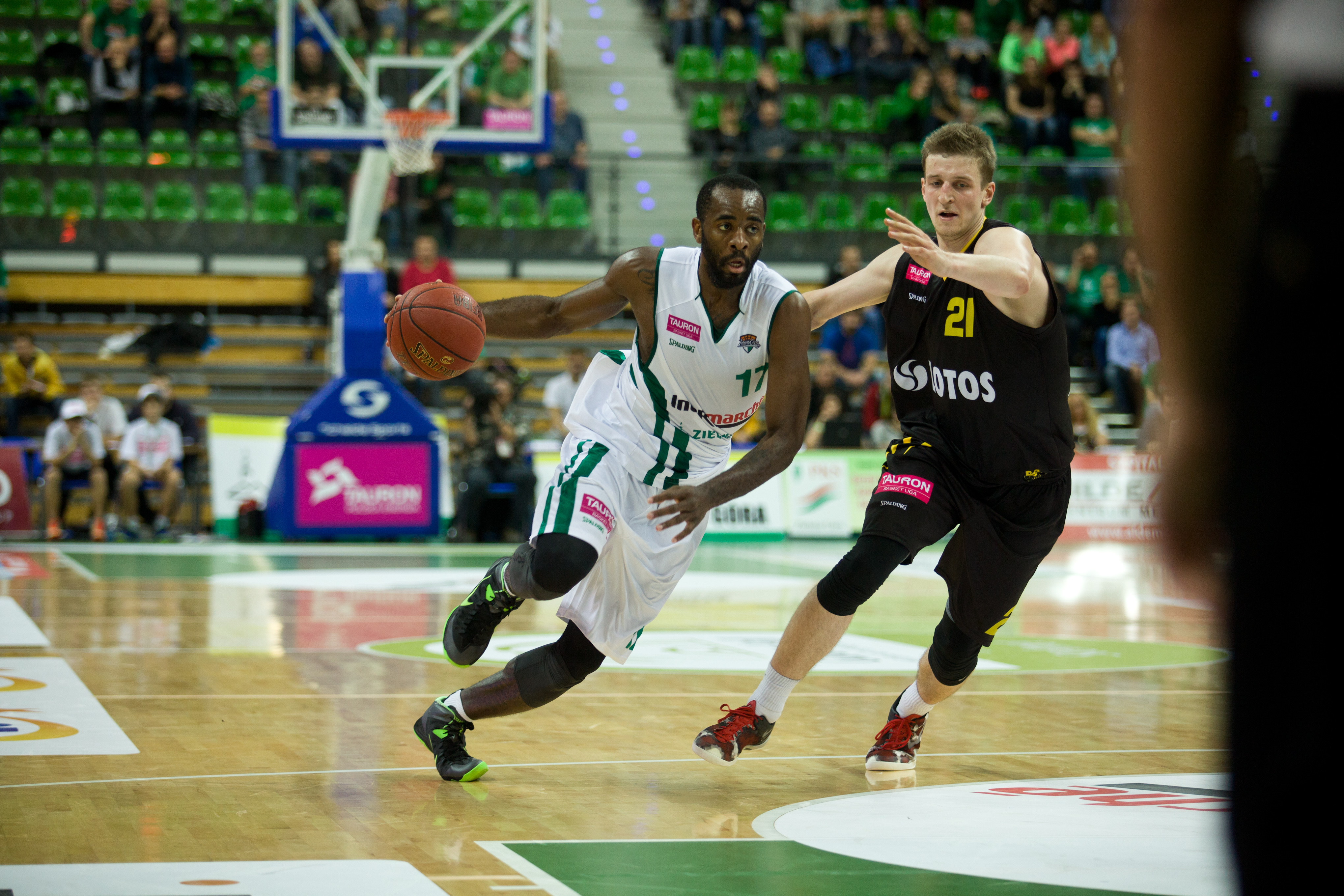 Christian Eyenga, Stelmet Zielona Góra, Adam Waczyński, Treﬂ Sopot